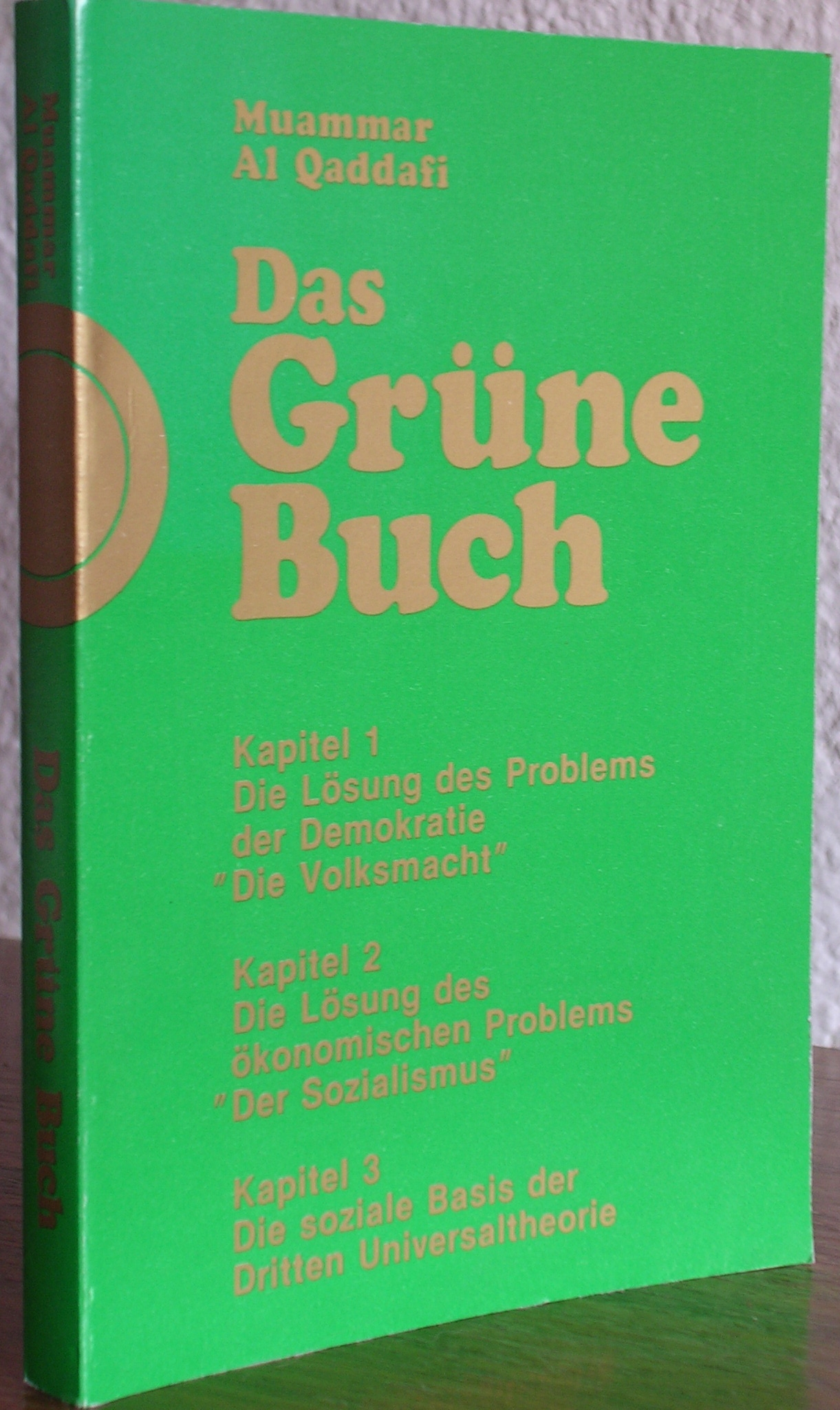 Cover von "Das Gruene Buch" von Muammar Al Qaddafi